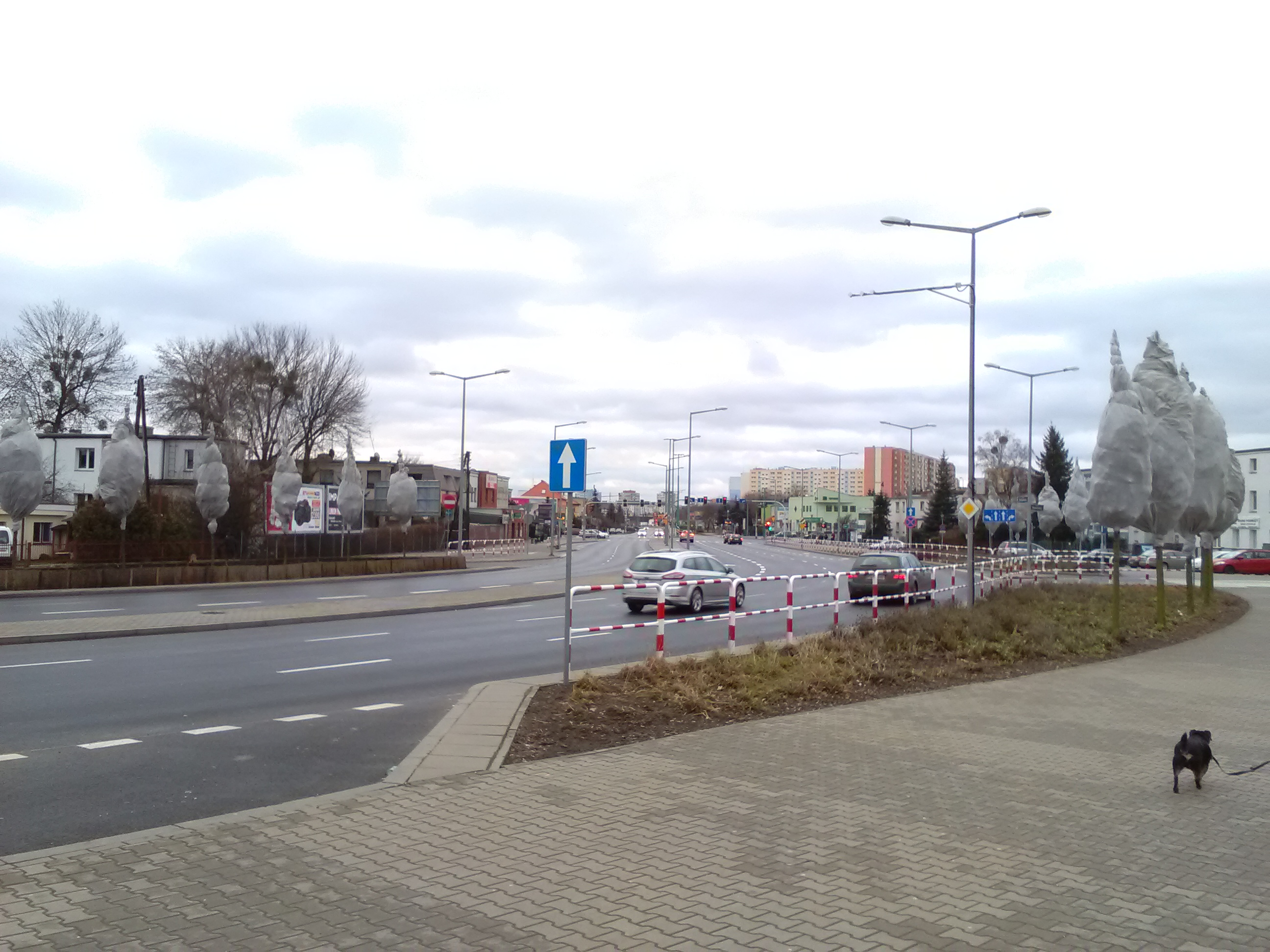 Ulica Bułgarska w Poznaniu.